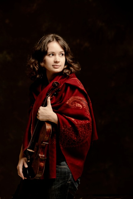 Patricia Kopatchinskaja (c) Marco Borggreve